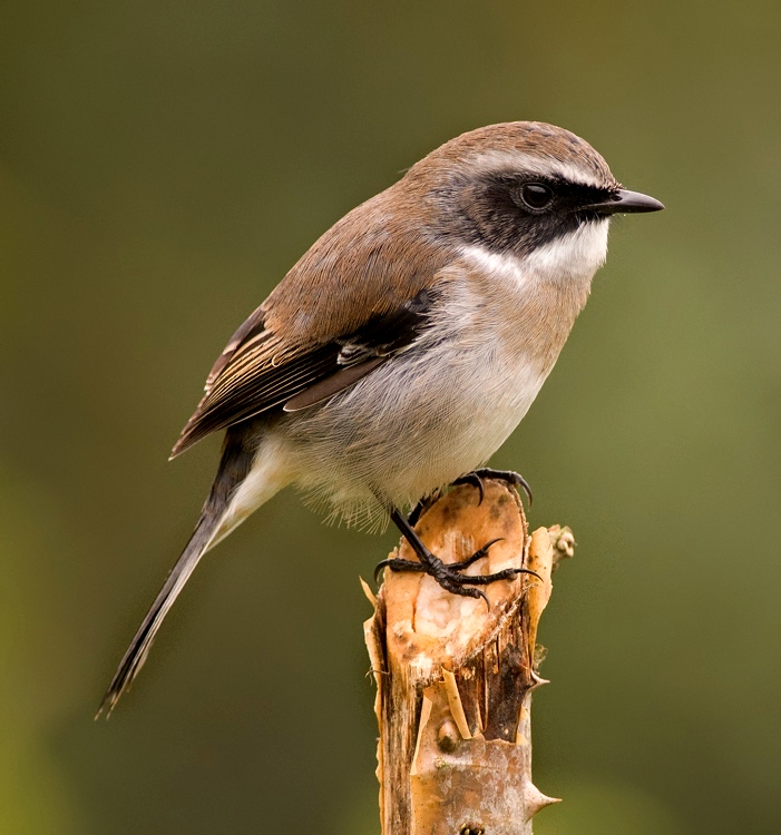 Birds, fauna